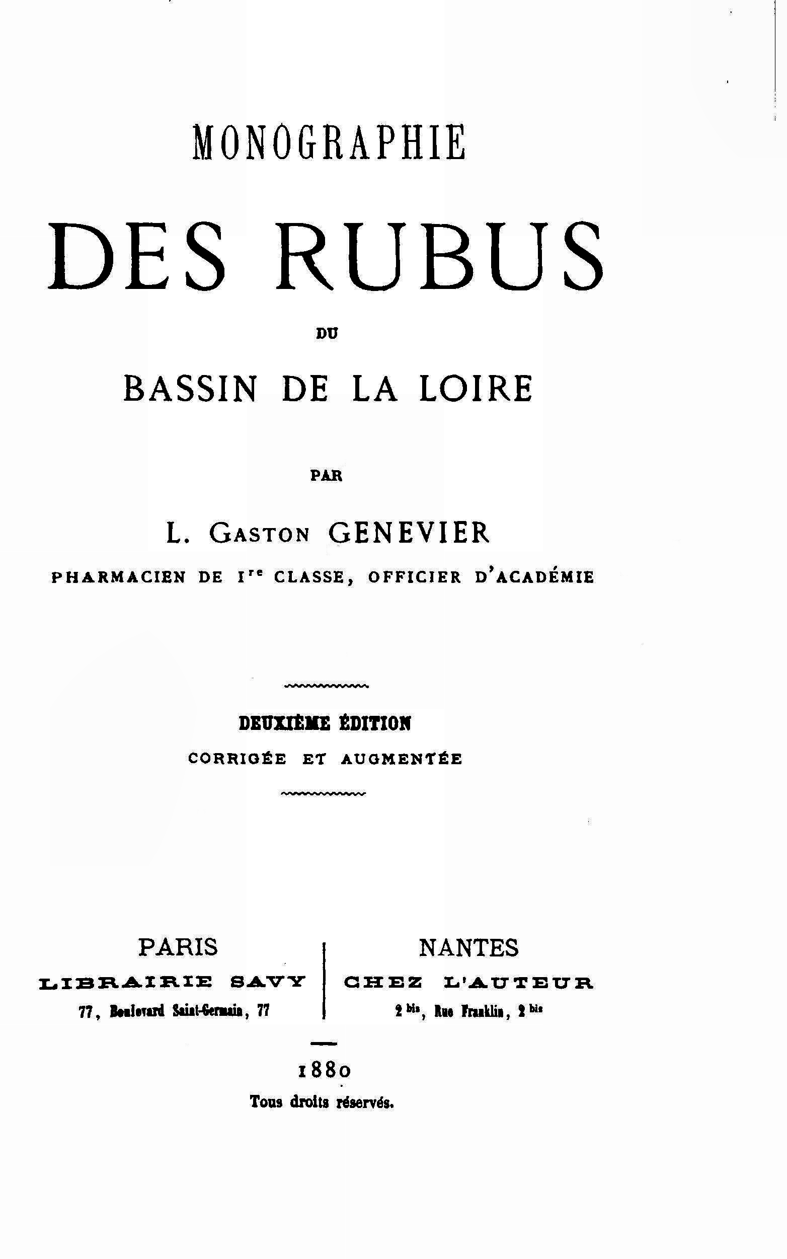 Léon Gaston Genevier: „Monographie des Rubus du bassin de la Loire”, ed. 2, Editura Savy, Paris, Nantes, 1880